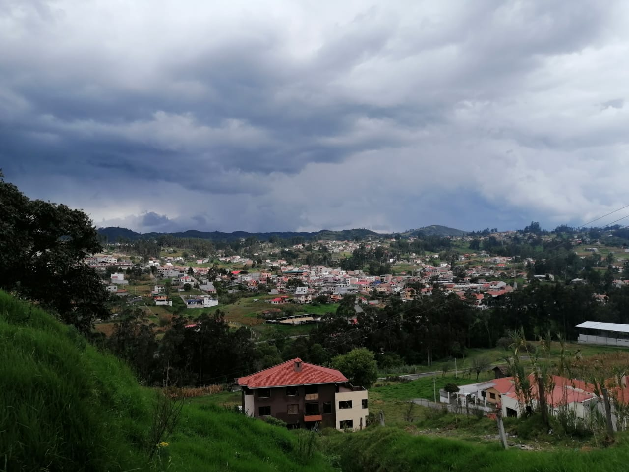 Vista que muestra principalmente todo el centro de El Valle.